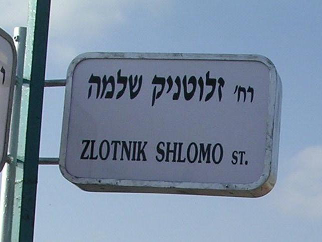 רחוב על שמו של שלמה זלוטניק